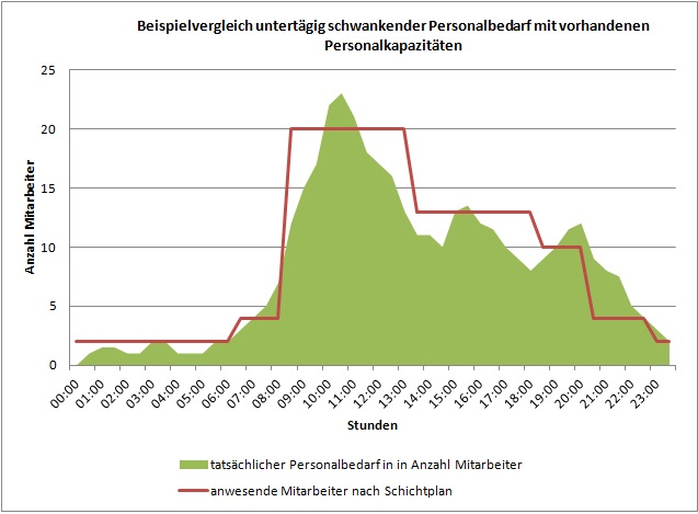 Vergleich zwischen saisonal schwankendem Personalbedarf und tatsächlich vorhandenen Personalkapazitäten